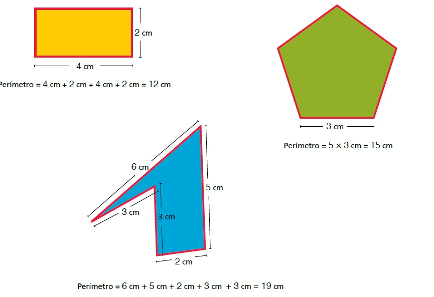 perimetro